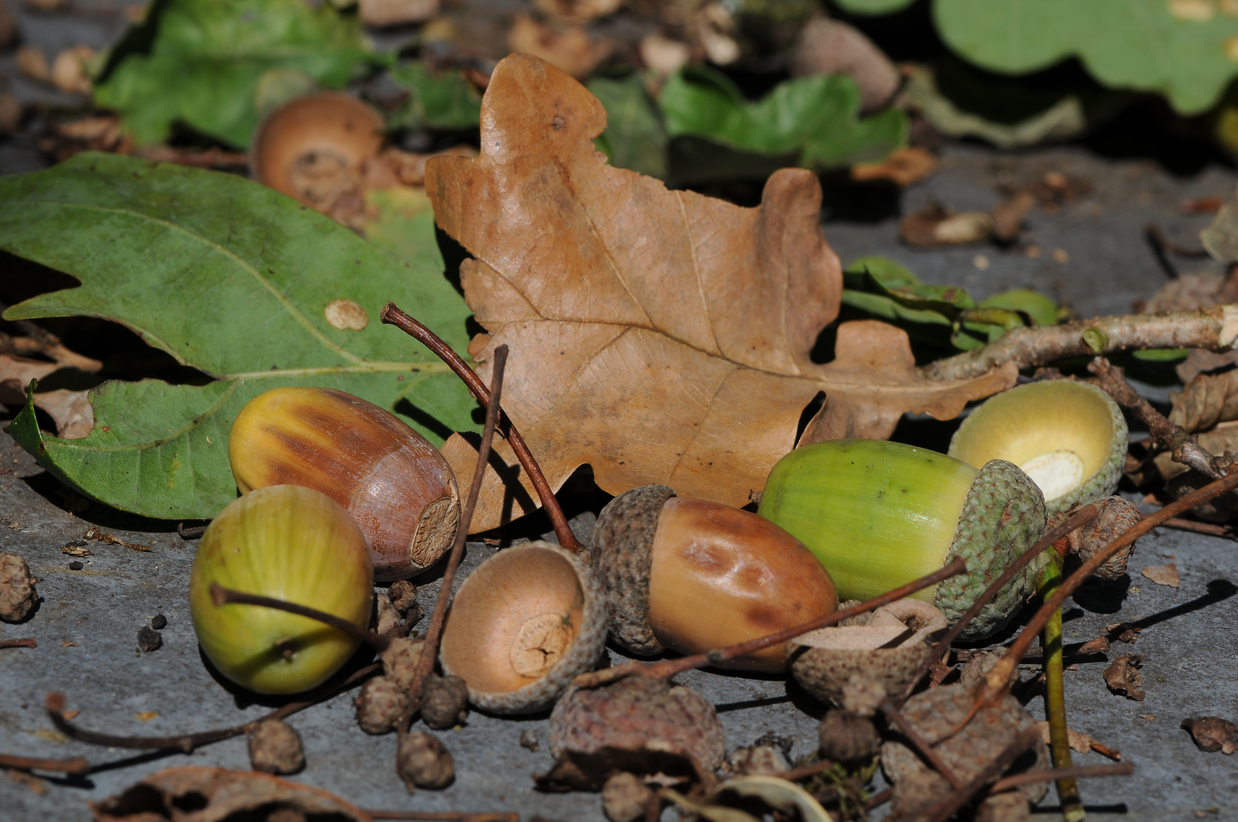 Eichel der Stieleiche.